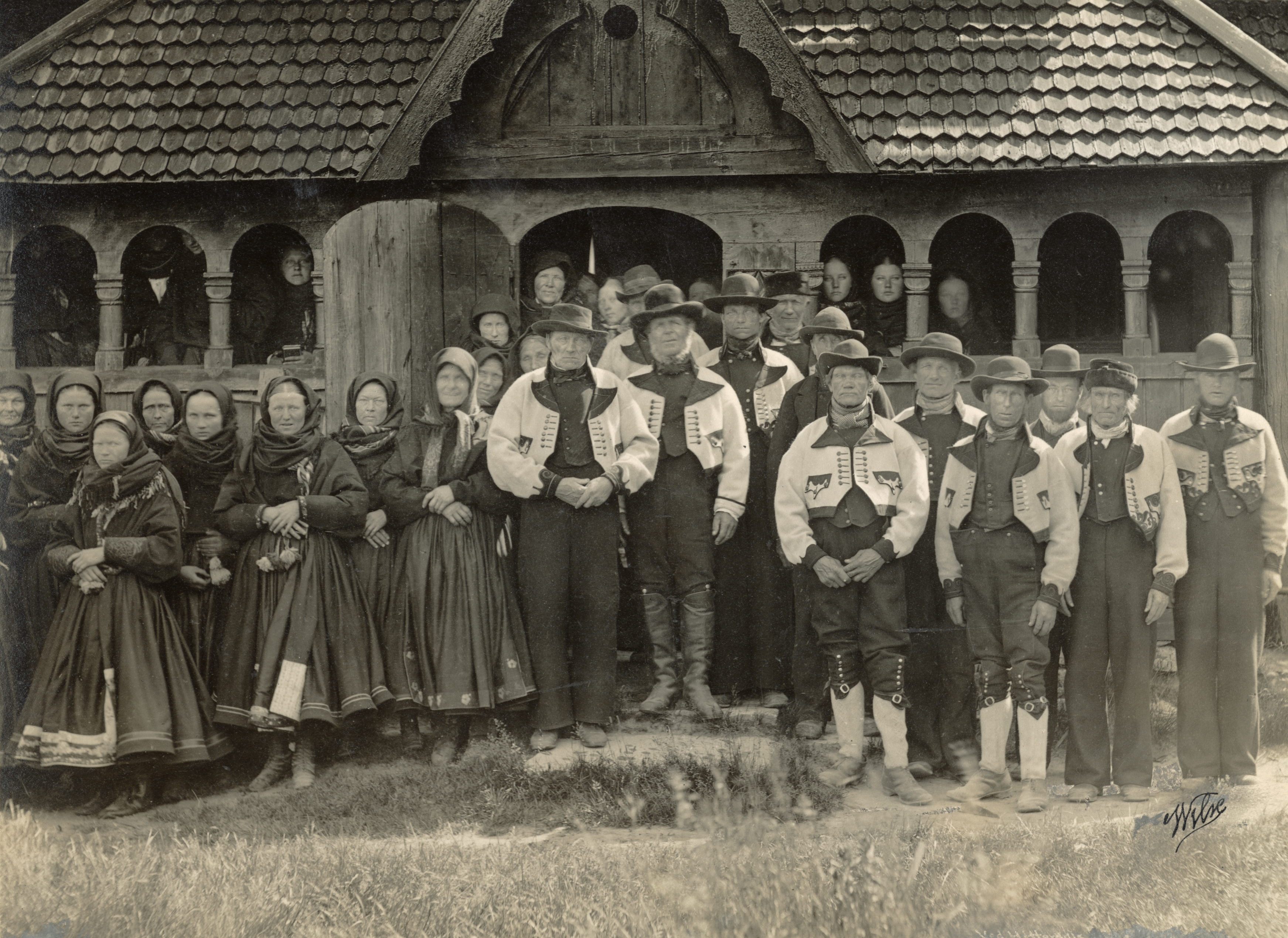 Heddal stavkirke i Heddal, Telemark Se også merket «Axel Lindahl» This image on crowdsourcing geotagging platform Fotodugnad